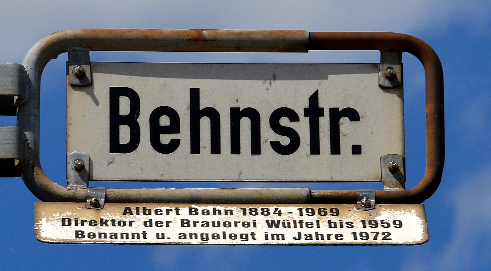 Straßenschild an der 1972 angelegten Behnstraße in Hannover, Stadtteil Hannover-Wülfel, Ecke Hildesheimer Straße, mit der Legendentafel „Albert Behn 1884 - 1996 / Direktor der Brauerei Wülfel bis 1959 / Benannt und angelegt 1972“ ...